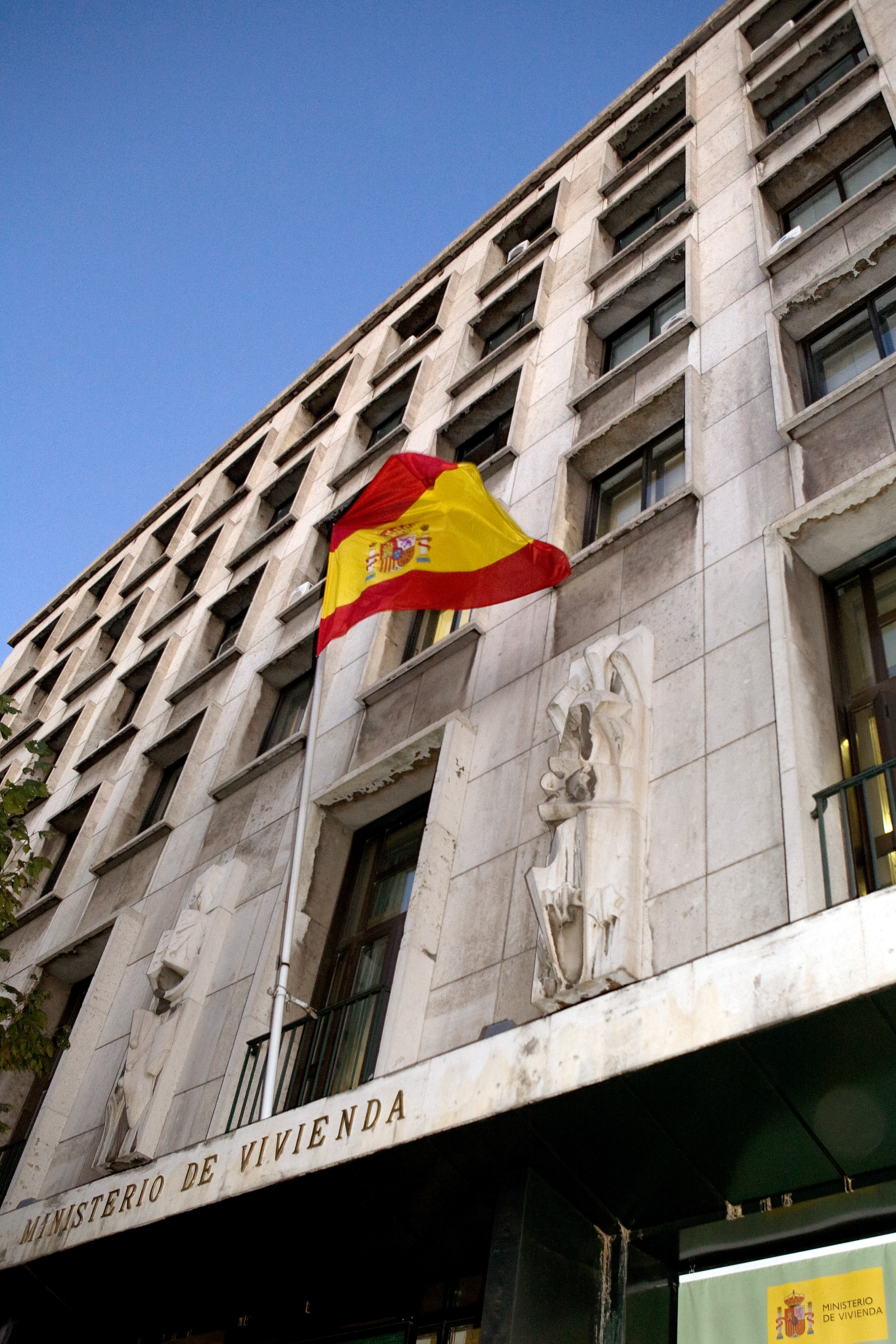 Fachada del Ministerio de Vivienda de España